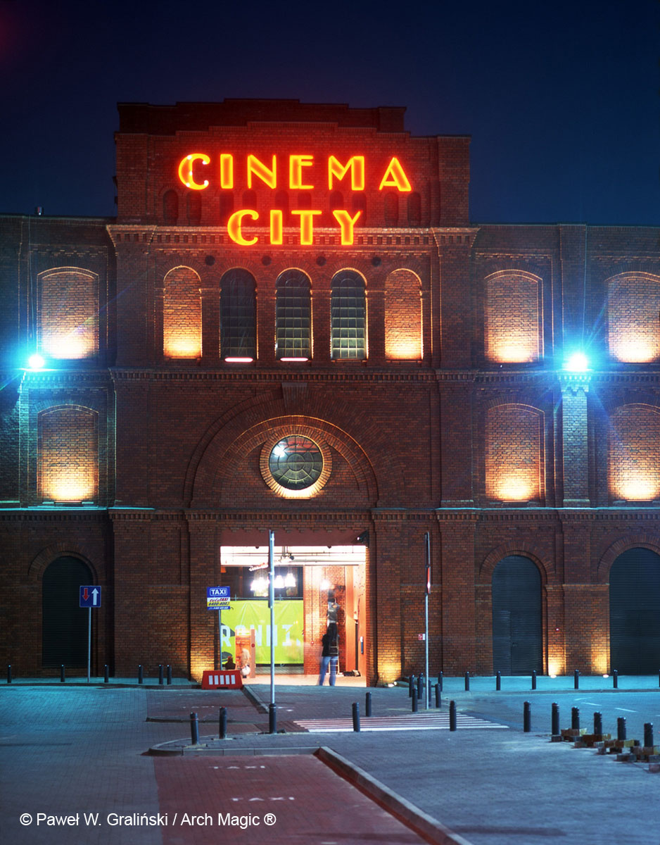 fasada kina Cinema City w CH Manufaktura